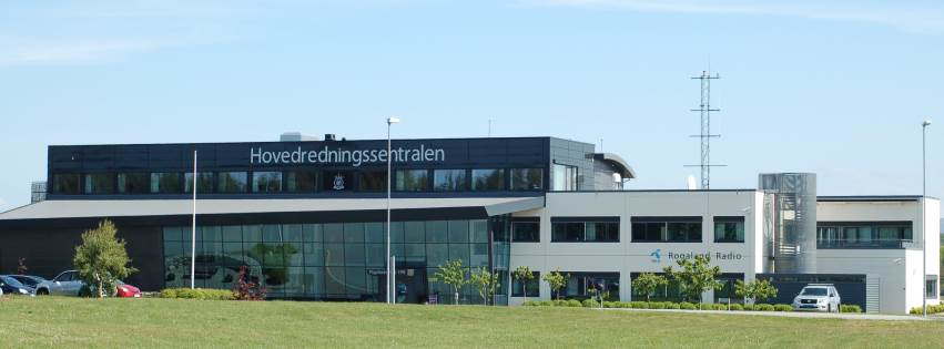 Flyplassvegen 190